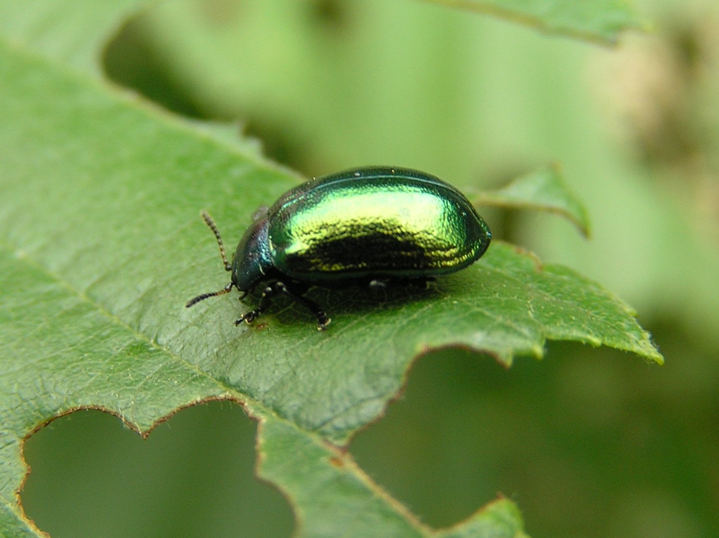 Melasoma aenea, chrząszcz rynnicy olszowej.